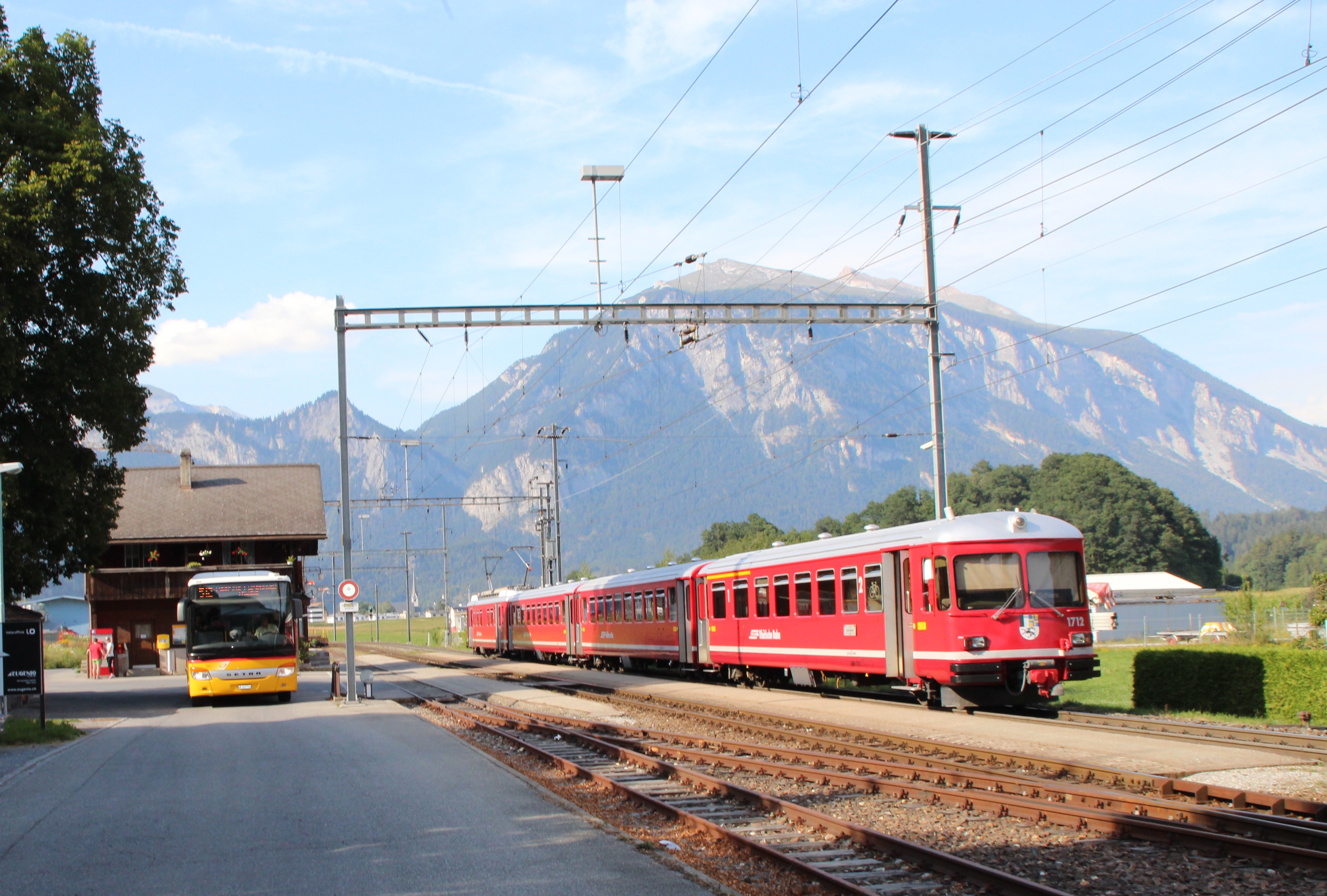 Rhäzüns Bahnhof RhB